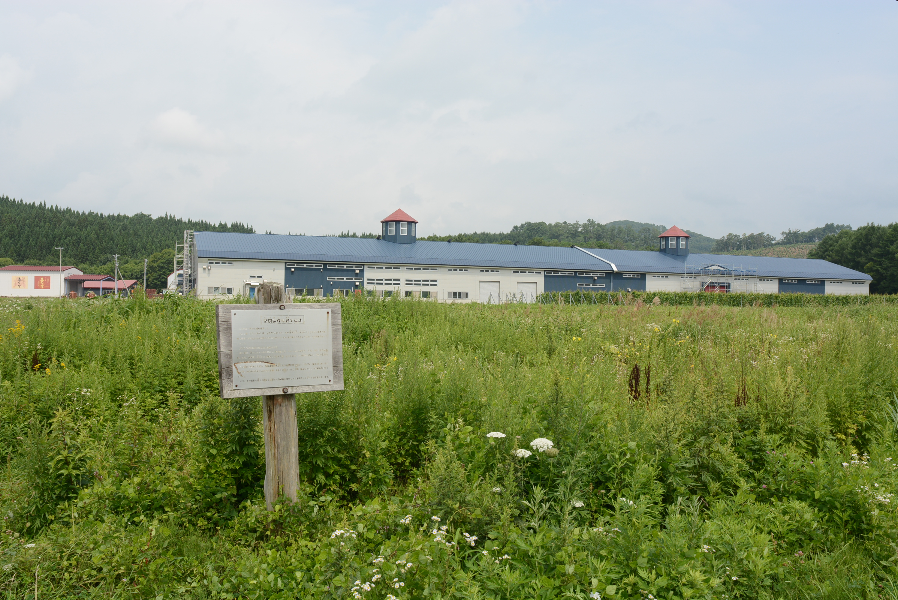 大正年間に稼働した麻工場の跡。現在は札幌酒精の焼酎工場が建設されている。